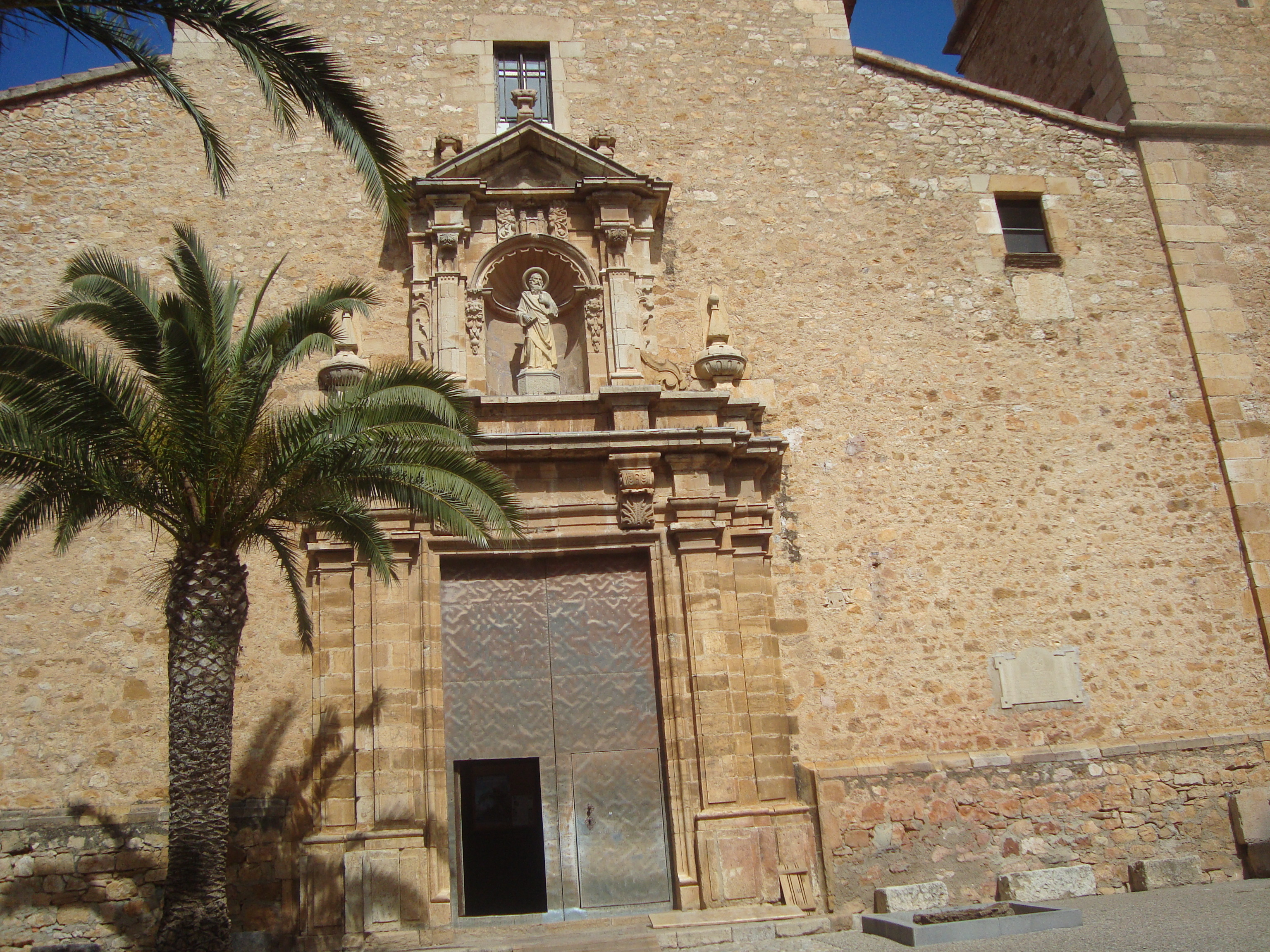 Església parroquial de Sant Bartomeu (Vilanova d'Alcolea) 05.132-002.